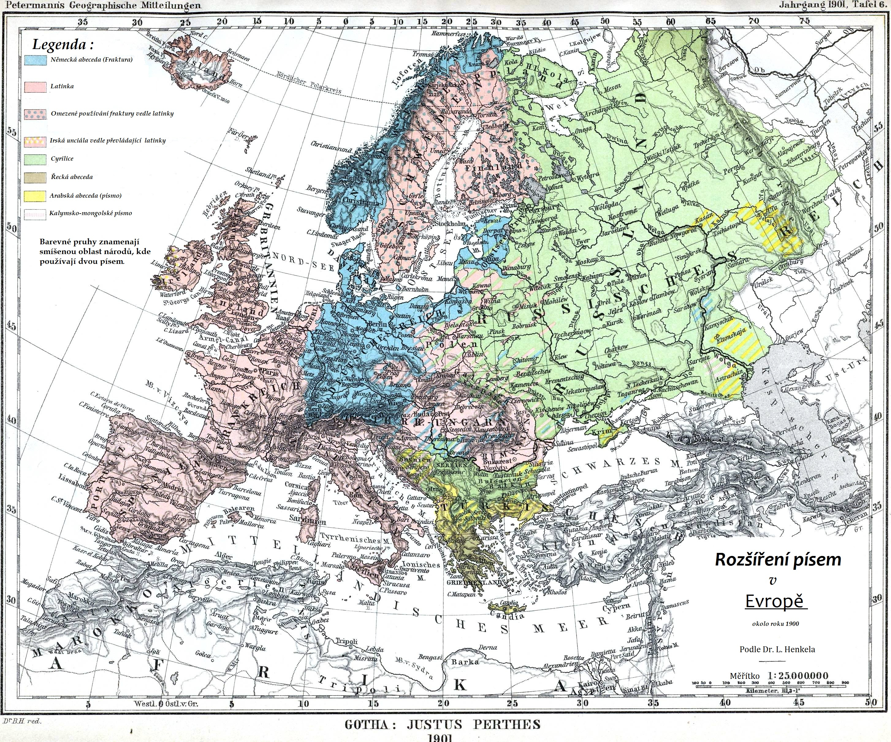 Rozšíření písem v Evropě okolo roku 1900. Přeloženo a převzato z německého originálu.